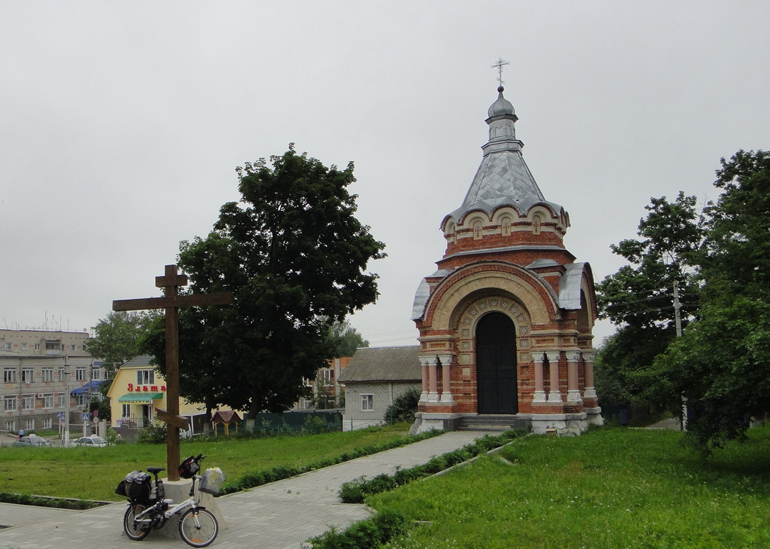 Часовня-усыпальница Искрицкой (Брянская область, Сураж, город Сураж)